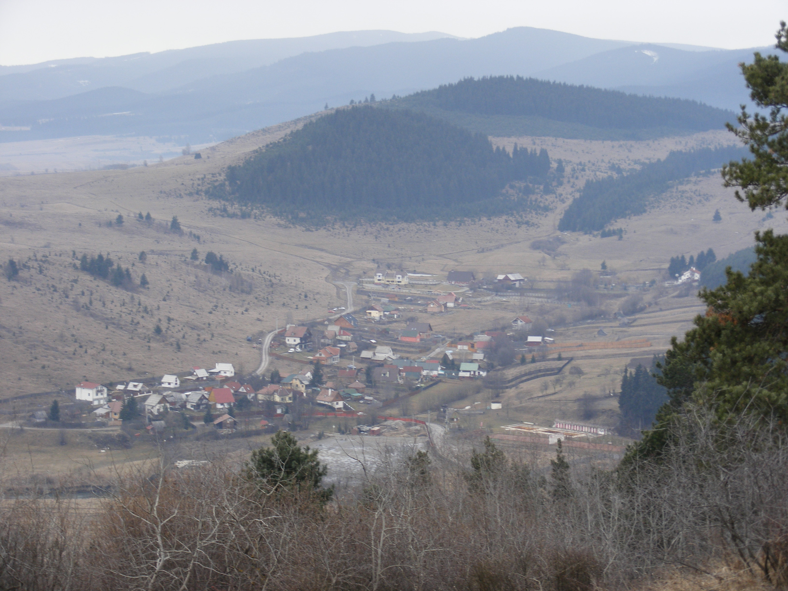 Zsögödfürdő